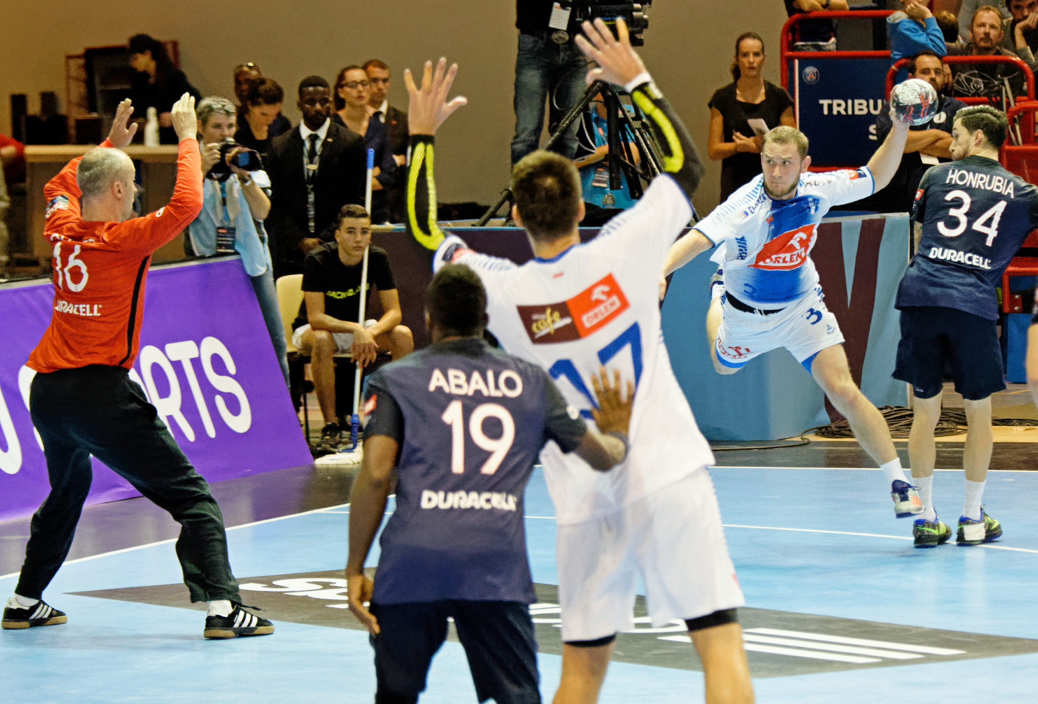 Rencontre de phase de groupe de la ligue des champions 2015-16 entre le PSG et le club polonais de Orlen Wisla Plock. A la Halle Carpentier (Paris), le 27 septembre 2015.